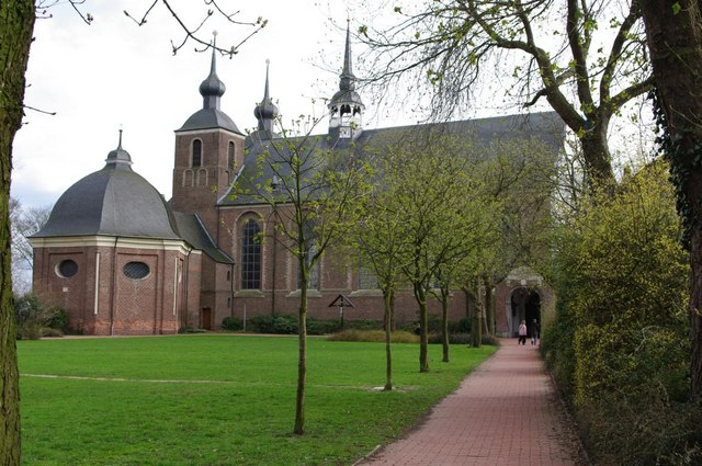 Kloster Kamp